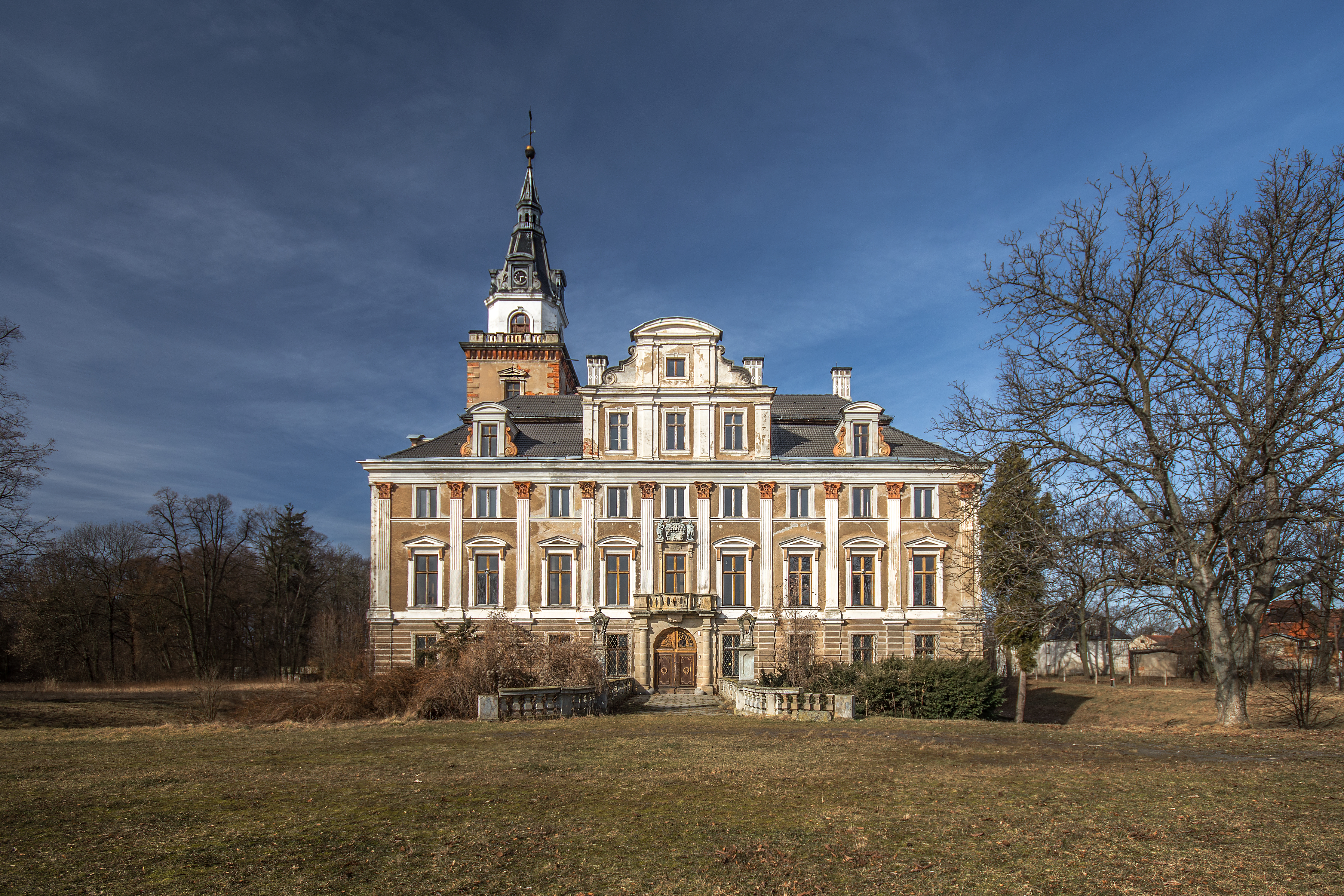 Roztoka, pałac, 1 poł. XVIII, XIX